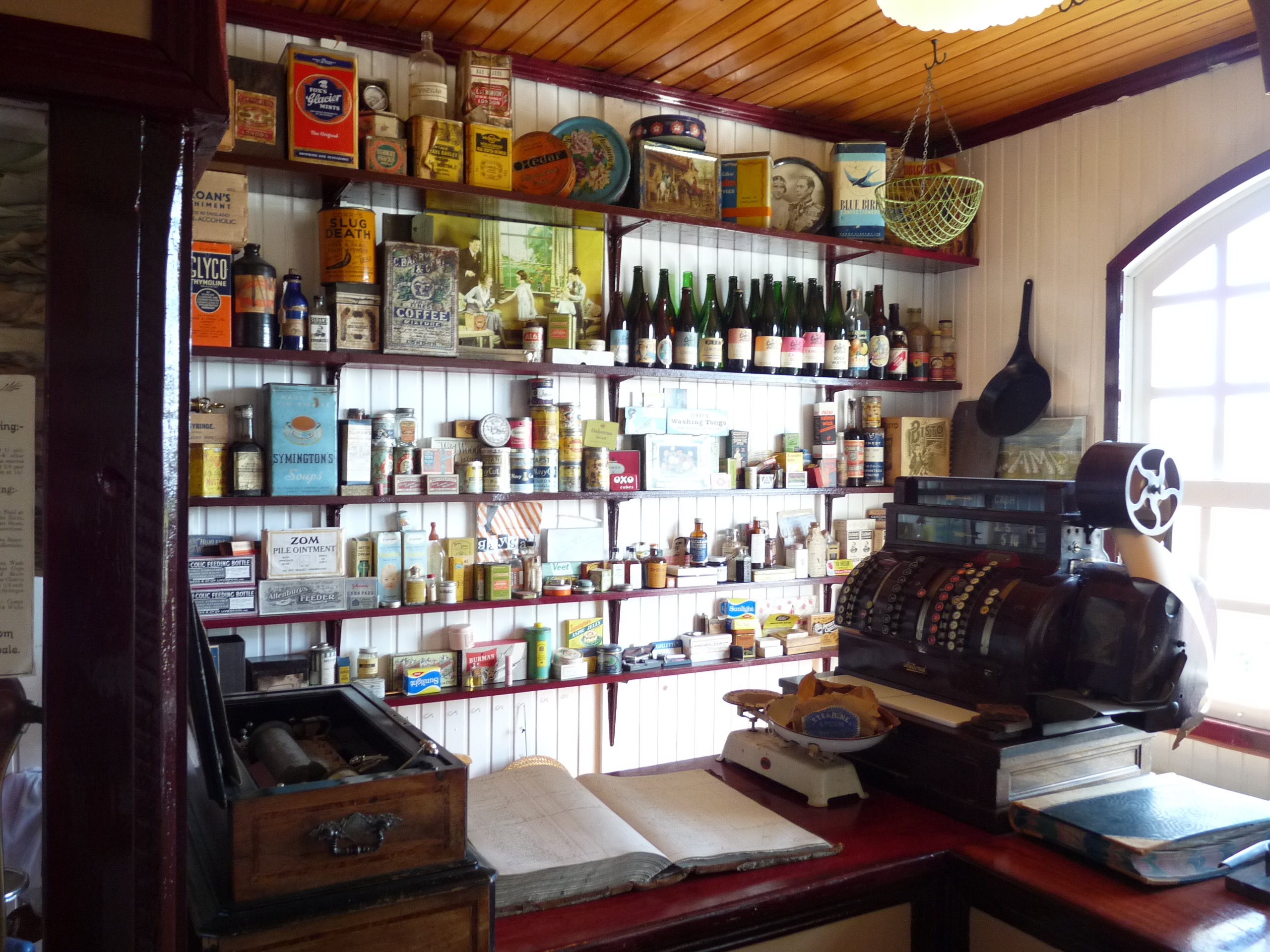 Museum 02